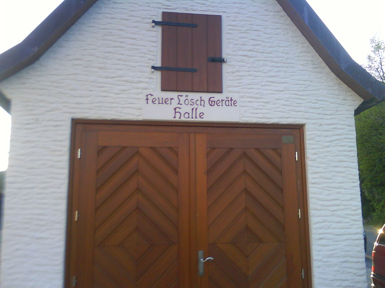 FFW von Weiher